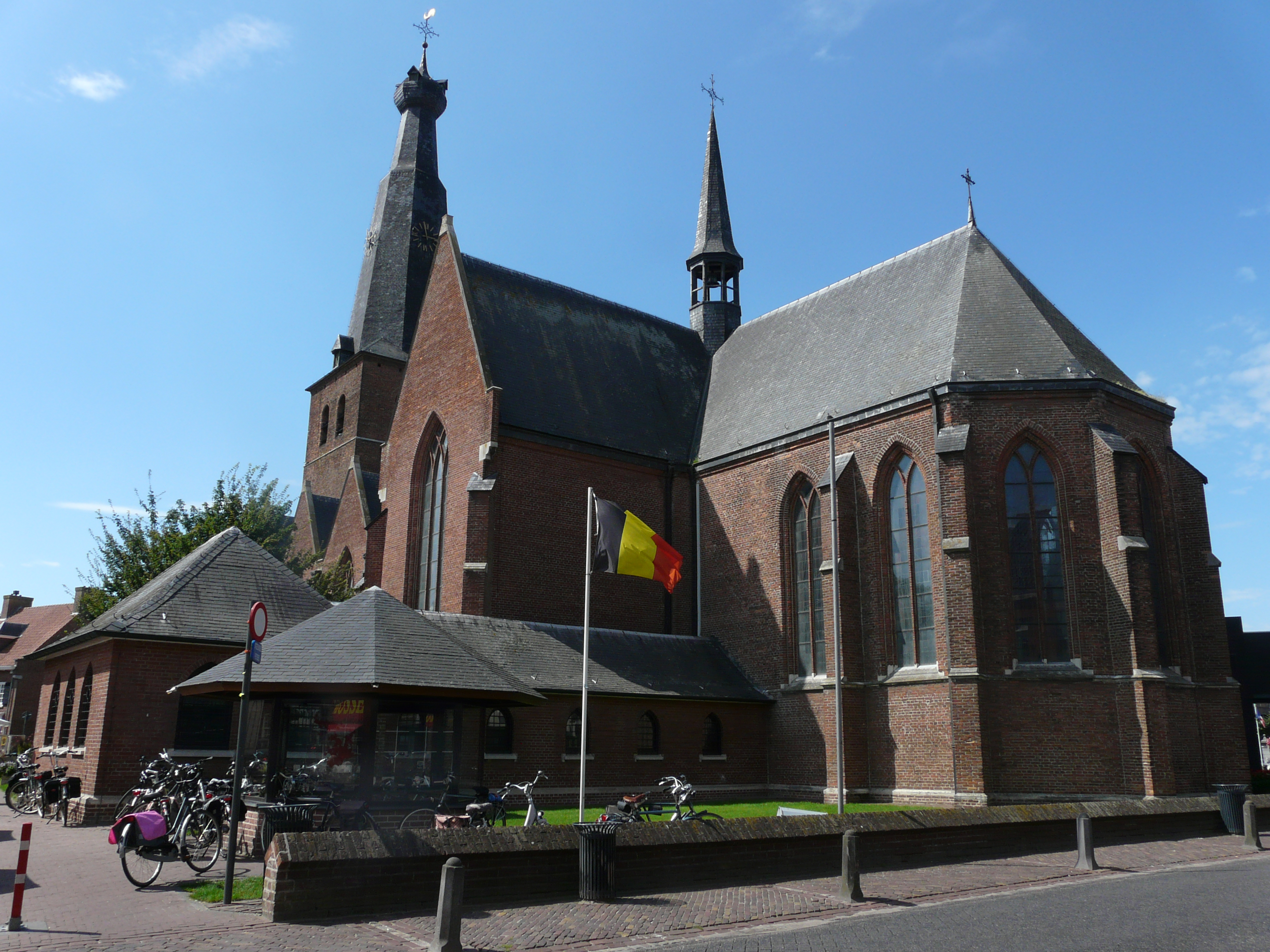 Sint-Remigiuskerk in Baarle-Hertog